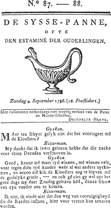 Titelpagina van het blad De Sysse-panne, ofte den Estaminé der Ouderlingen, N.° 87.-88, van Zondag 4. September 1796. (18. Fructidort.)